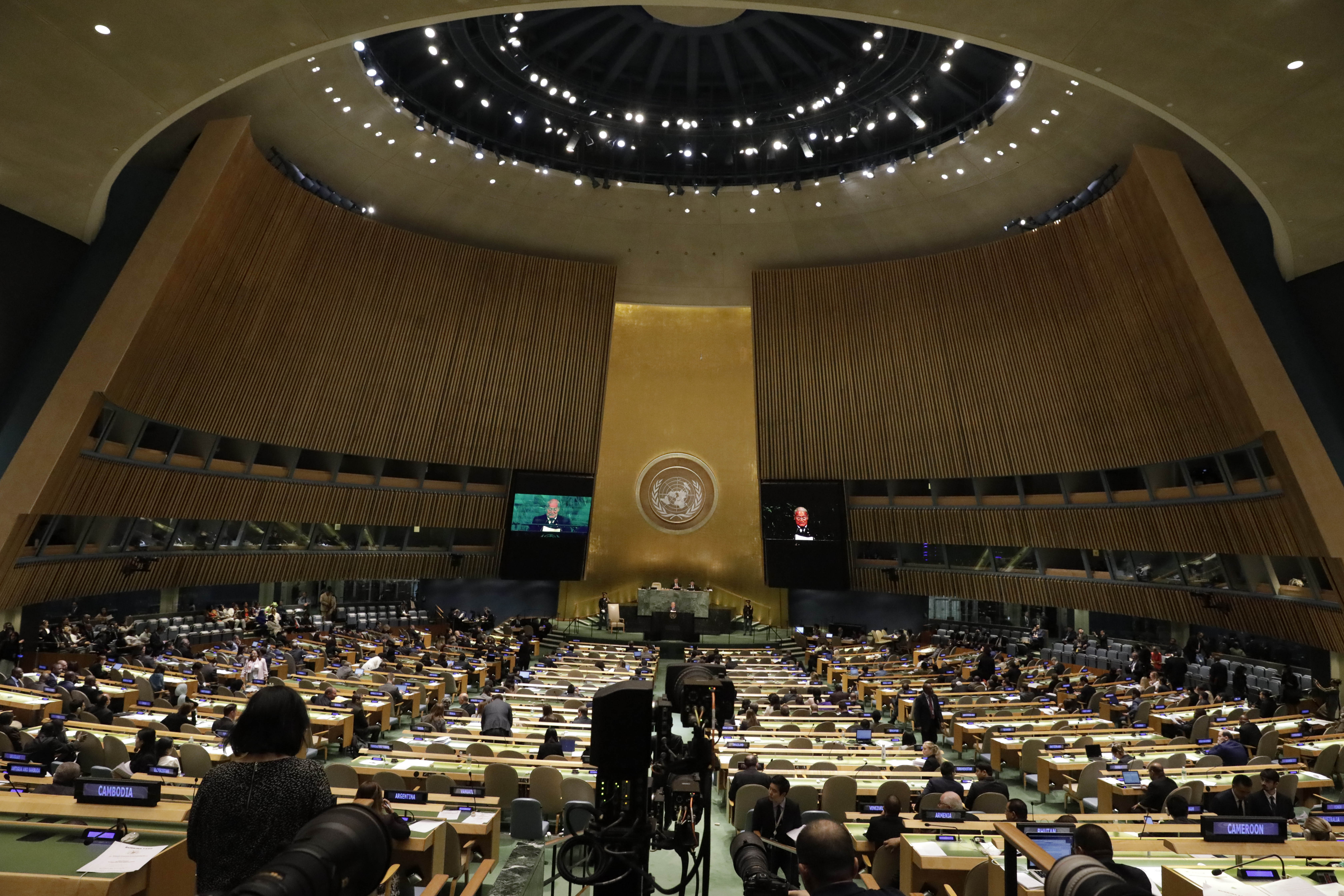 Presidente Salvador Sánchez Cerén .